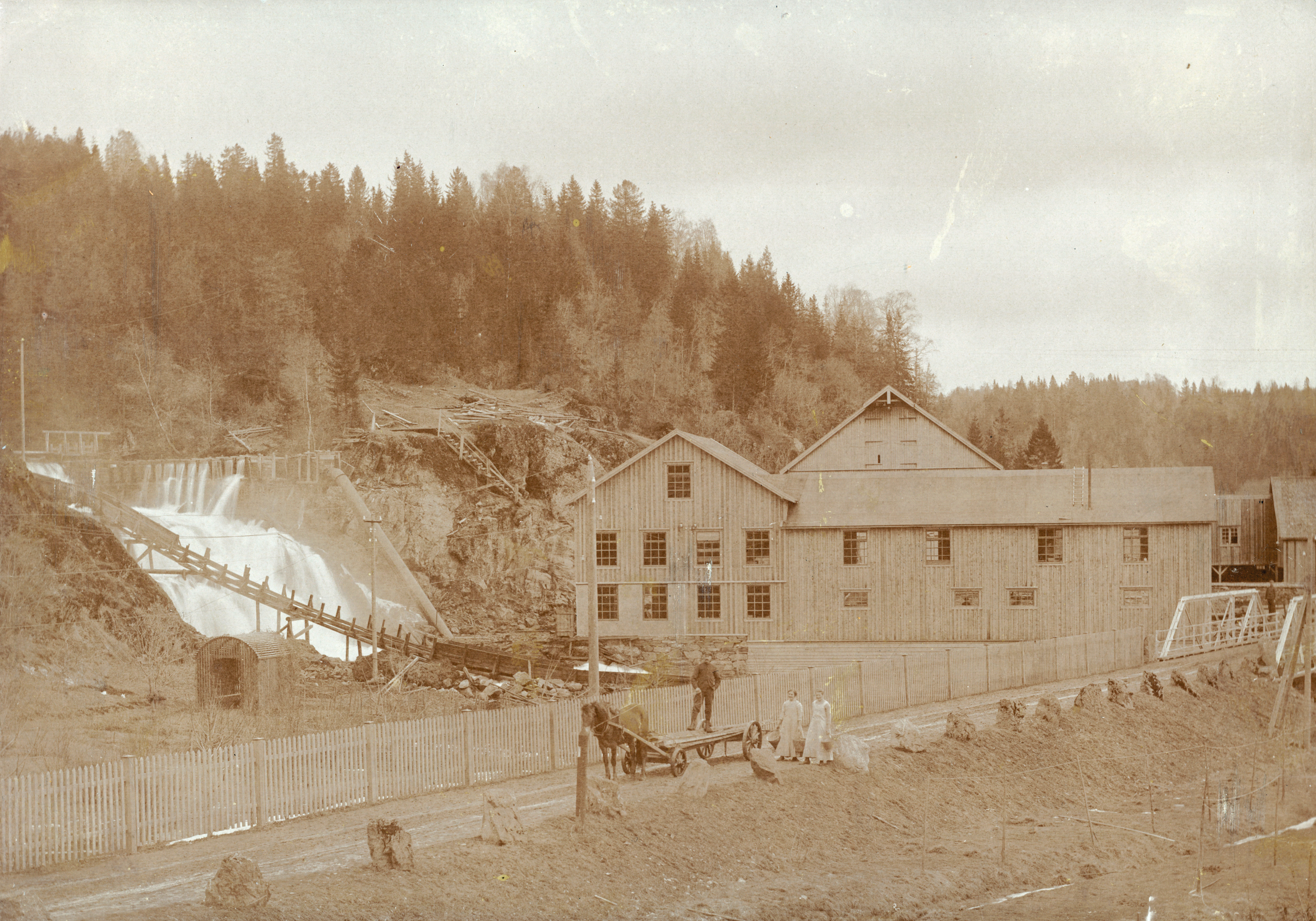 Nybygd mølle og sagbruk ved Hopla (227-1) i Åsen. Dette ble bygd i 1912-13, etter at sagbruk, tørkehus, mølle og to våningshus ble ødelagt av brann i desember 1911. I bakgrunnen skimtes gavlen av fjøset, bygd 1907-10. Ned langs fossen (t.v.) går både tømmerrenne og rørledning. Se Bygdebok for Åsen bind 4, s. 150-170. Personene midt i bildet - en mann med hest og vogn, og to kvinner med bøtter i hendene - er ukjente. Legg også merke til rodestolpen ved vegen, like foran hesten. Fotograf / Photographer: Ukjent Fotoeier / Photo owner: Tore Haabeth Digitalisering / Digitizing: Arne Langås Foto-ID / Photo ID: 094-0004 Har du utfyllende opplysninger? Legg gjerne igjen en kommentar nedenfor eller send e-post til . | Do you have additional information? Please leave a comment below or send an e-mail to .